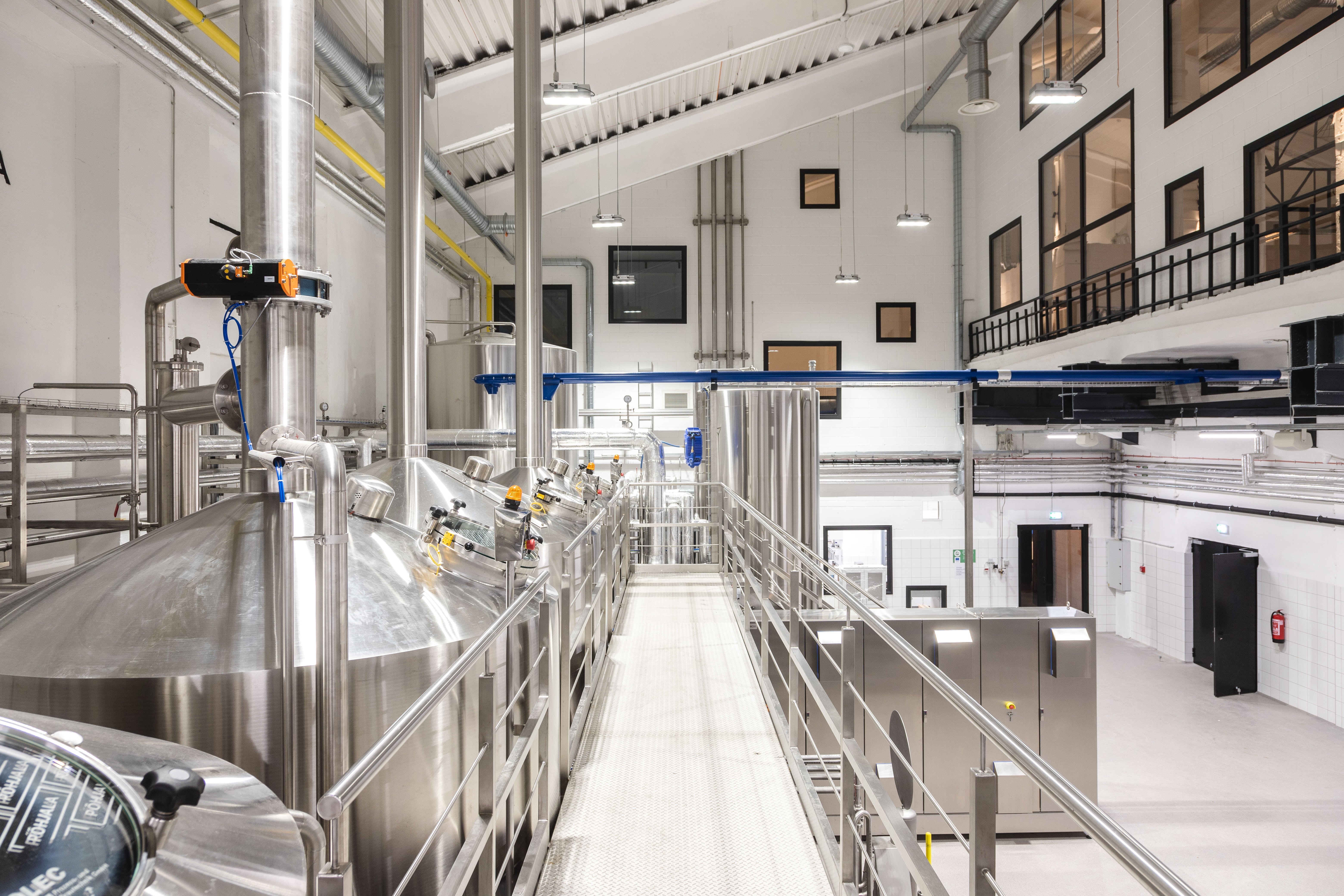 Põhjala Pruulikoja sisevaade